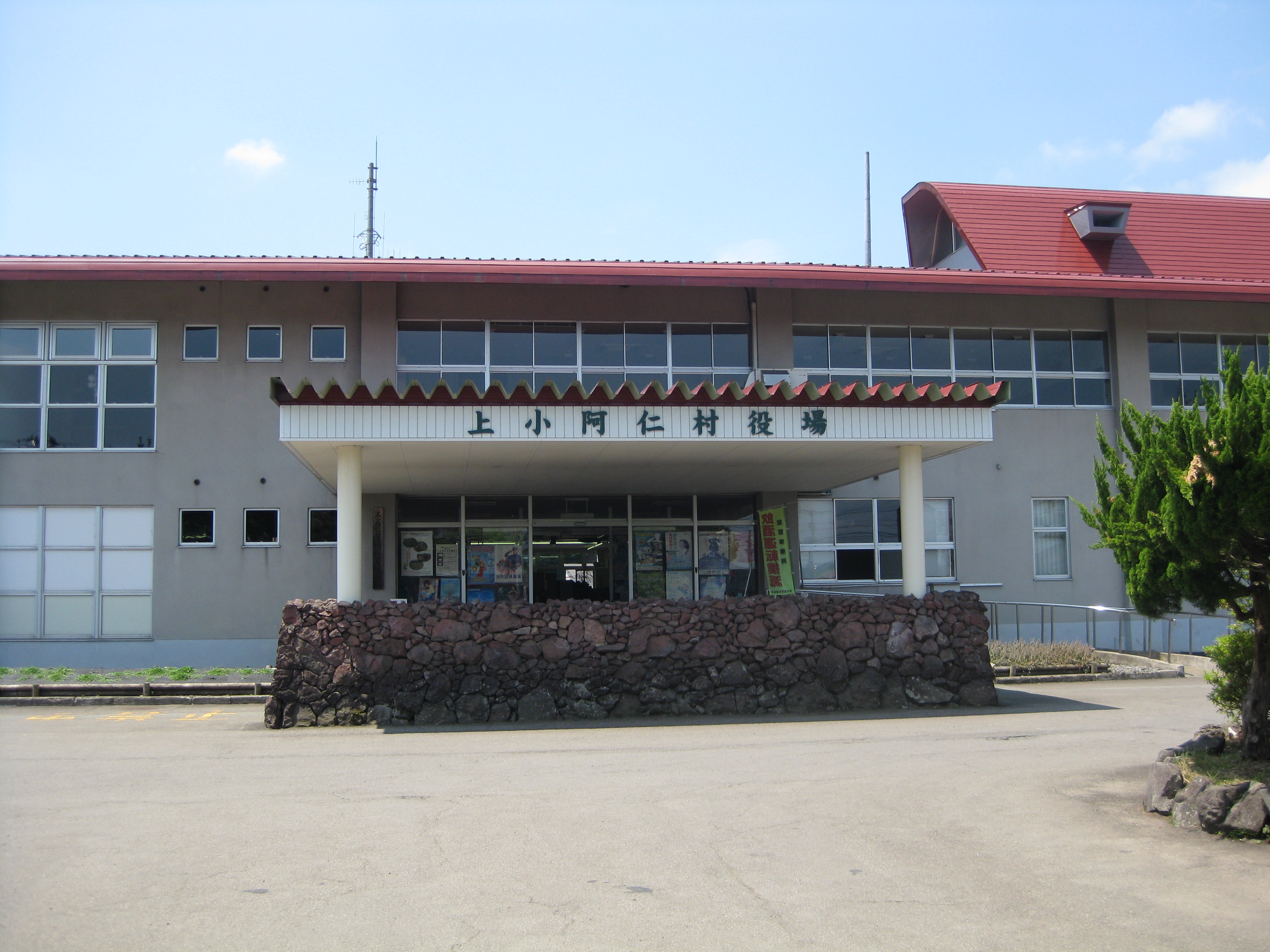 上小阿仁村役場